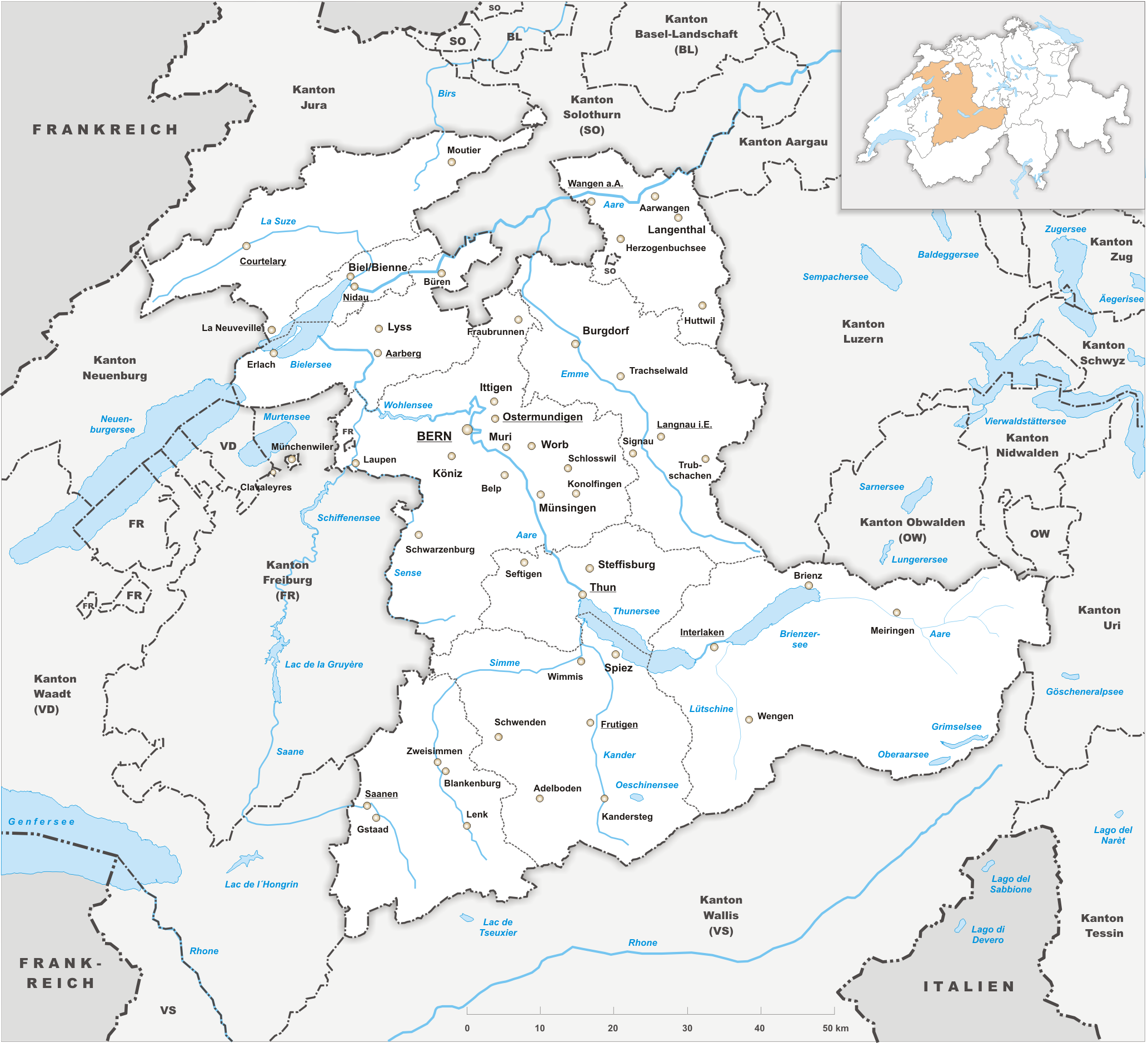 Karte des Kanton Bern.